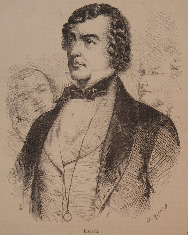 Disraéli